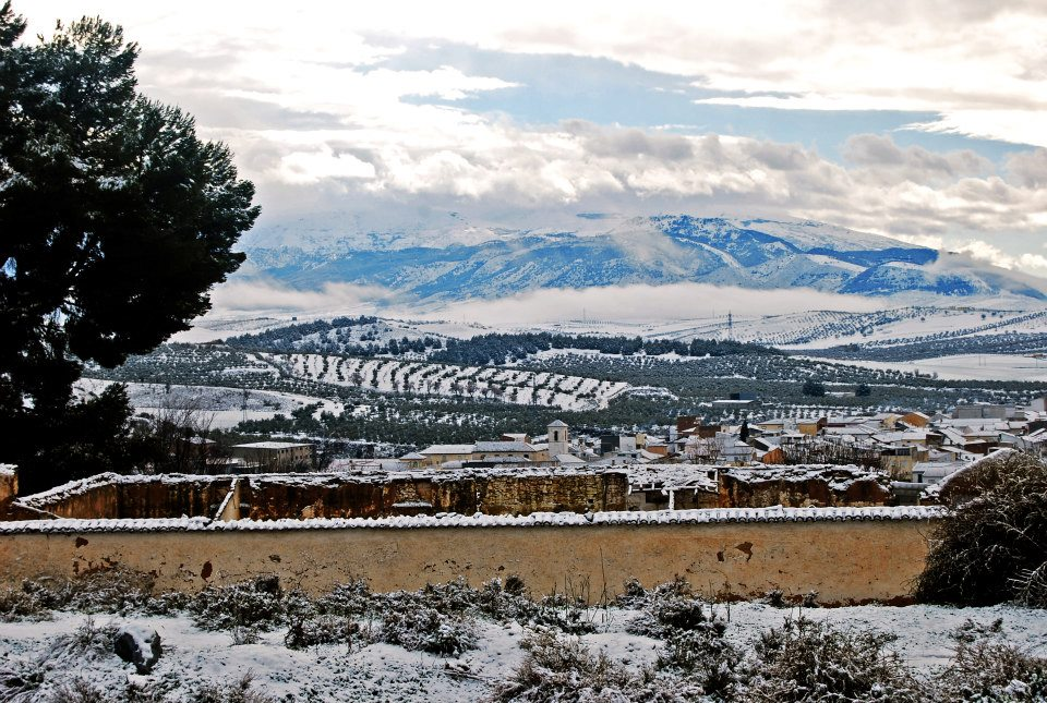 Nevada en la localidad de La Malahá, provincia de Granada (España).